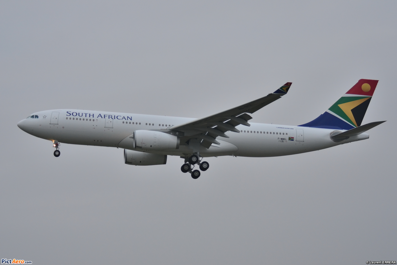 Photo prise à l'aéroport de Toulouse-Blagnac (LFBO) en France. Picture take at Toulouse-Blagnac Airport (LFBO) in France.